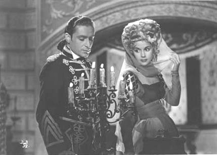 Enrique Alvarez Diosdado y delia Garcés. Película "La dama duende" (1945).